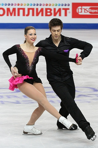 Люция Мысливечкова и Нейл Браун (Чехия) на чемпионате Европы по фигурному катанию 2012